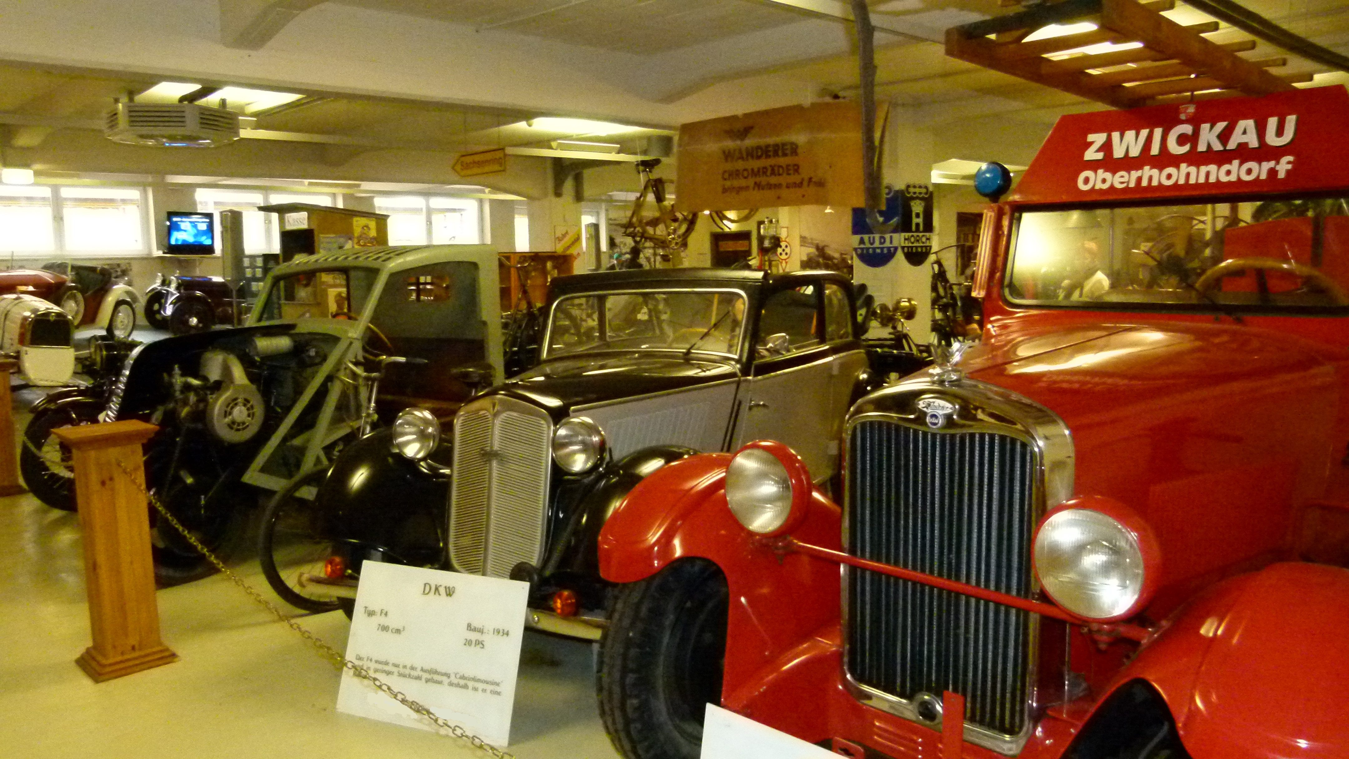 Museum für sächsische Fahrzeuge, Chemnitz: DKW F4 (Mitte) und Wanderer W11 der Oberhohndorfer Feuerwehr (rechts)